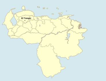 Mapa de El Tocuyo